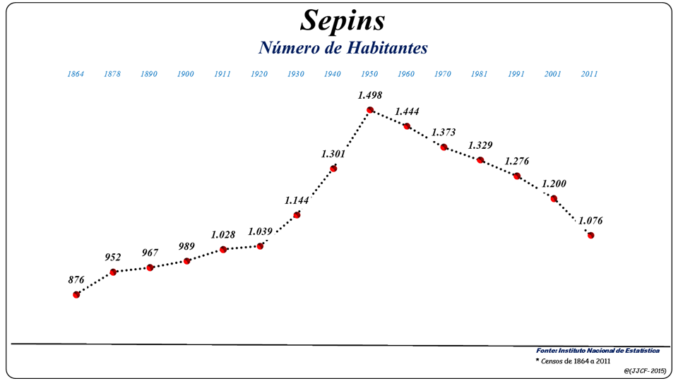 População